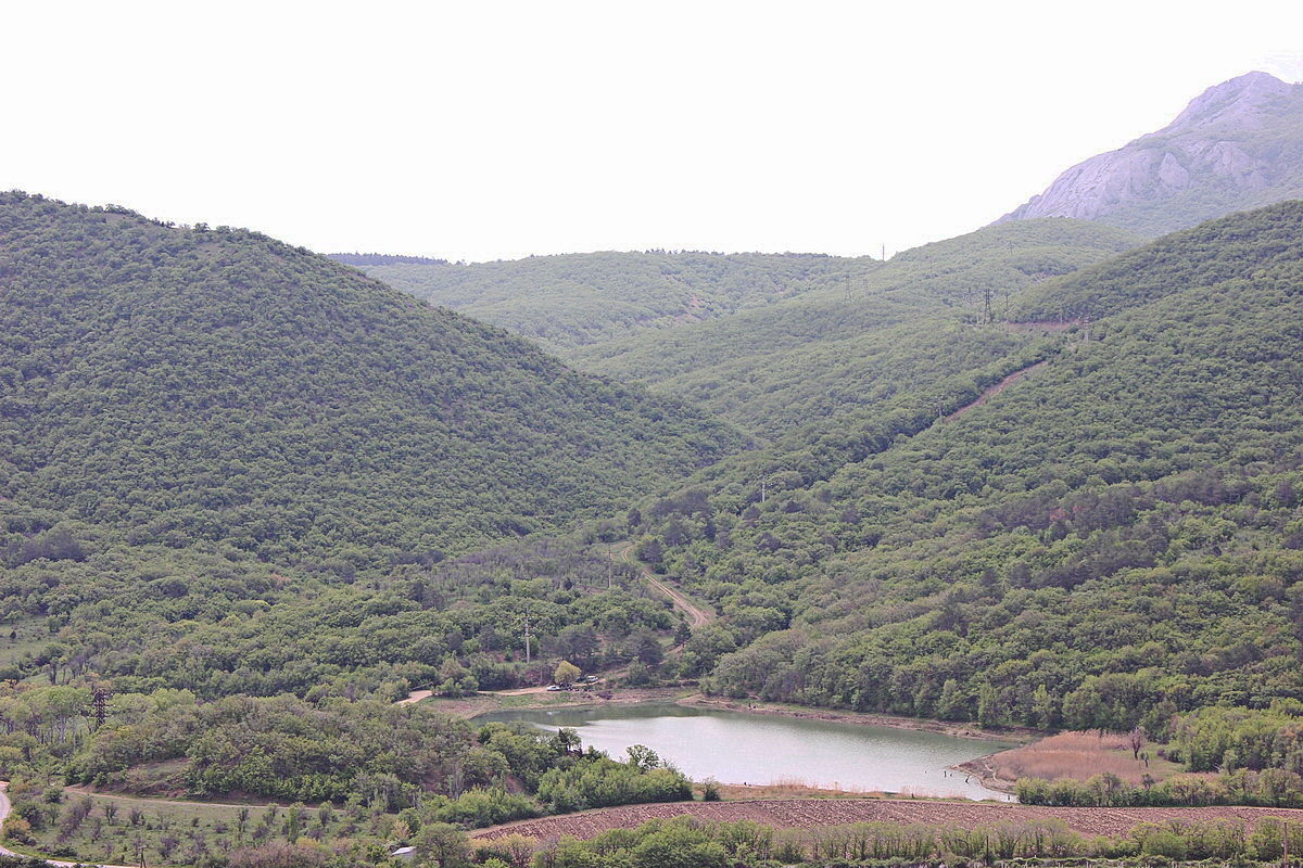 Пруд на Монастырском ручье, Крым